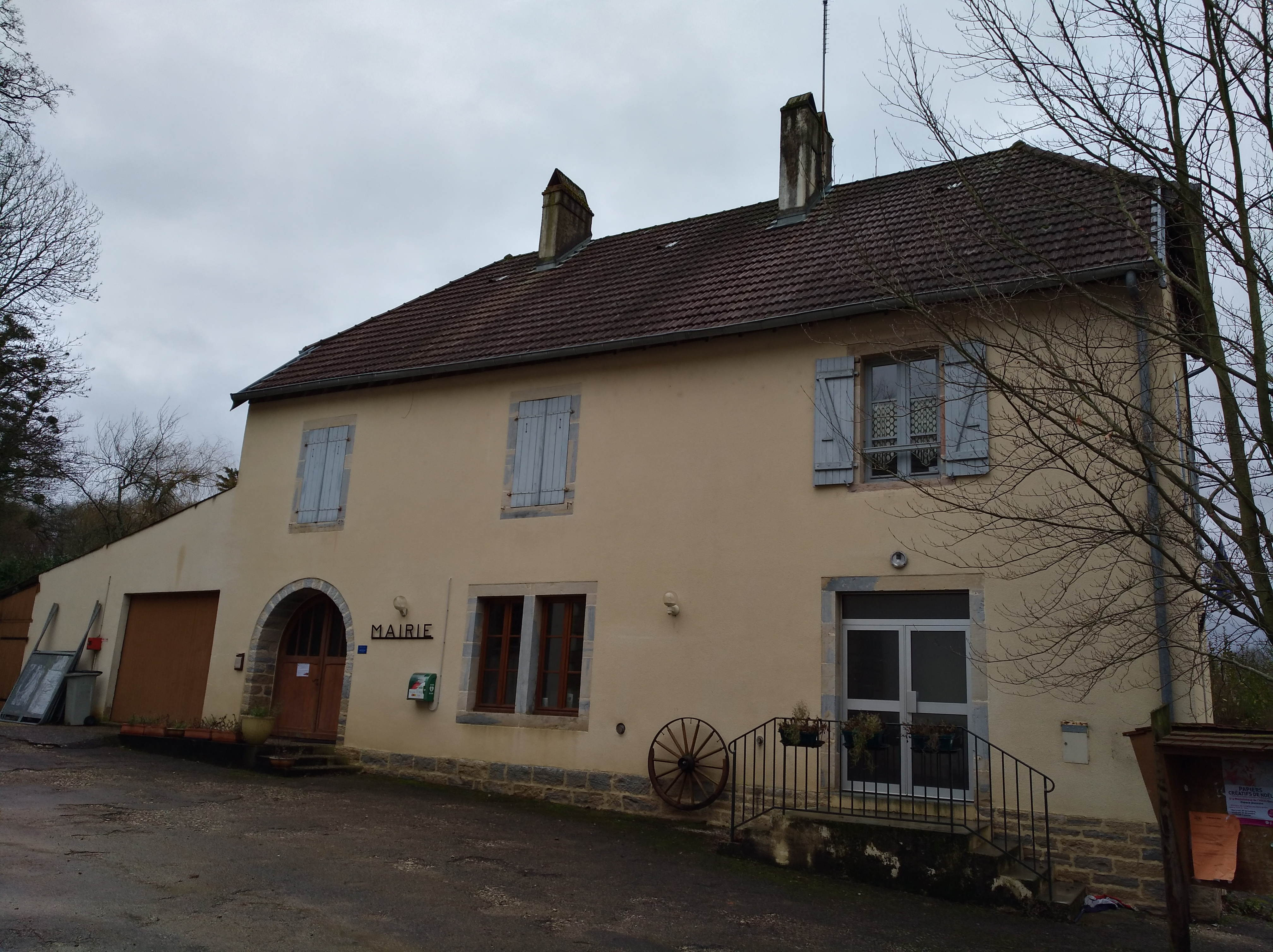 Éclans (commune d'Éclans-Nenon, Jura, France) en janvier 2018.